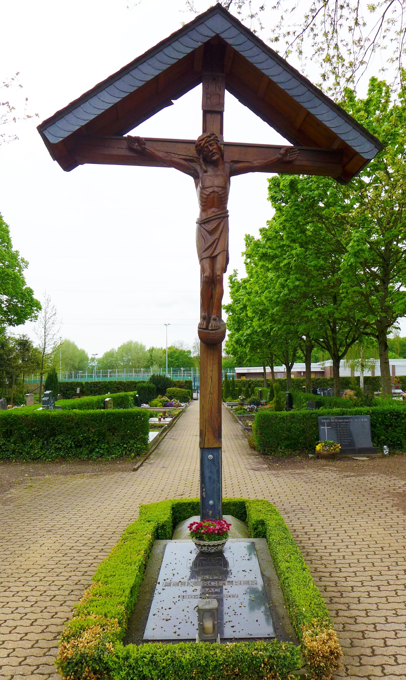 Diefflen, Großes Friedhofskreuz, Ehrengrab der Gemeinde Diefflen für Pater Felix Scherer (1904-1957)